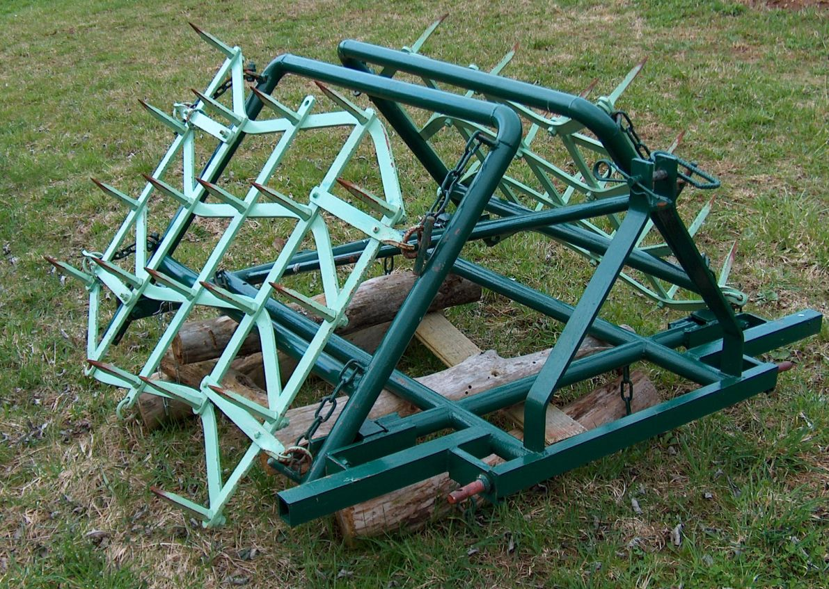 alte Zinkenegge